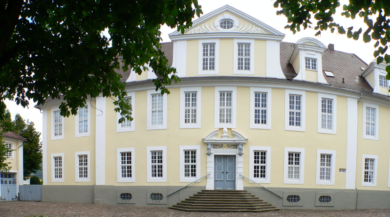 Barockschloss von Landgraf Carl von Hessen, erbaut 1689 in Veckerhagen (Reinhardshagen), Weserbergland, Hessen